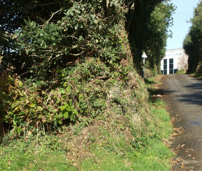 Vestiges du mur du diable.